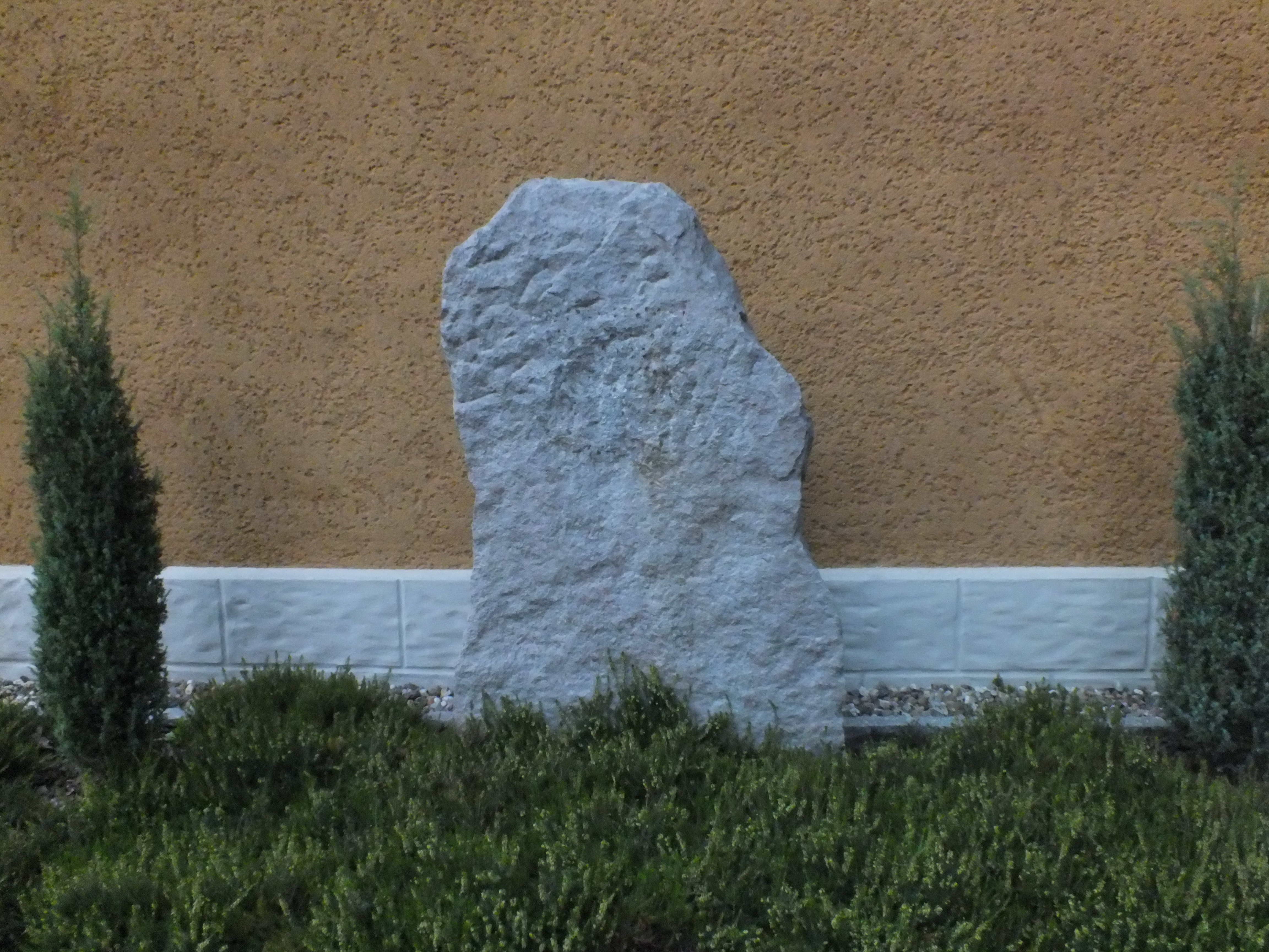 Straße in Berlin-Rahnsdorf, Friedhof Rahnsdorf; Friedhofskapelle mit histor. Grabstein davor